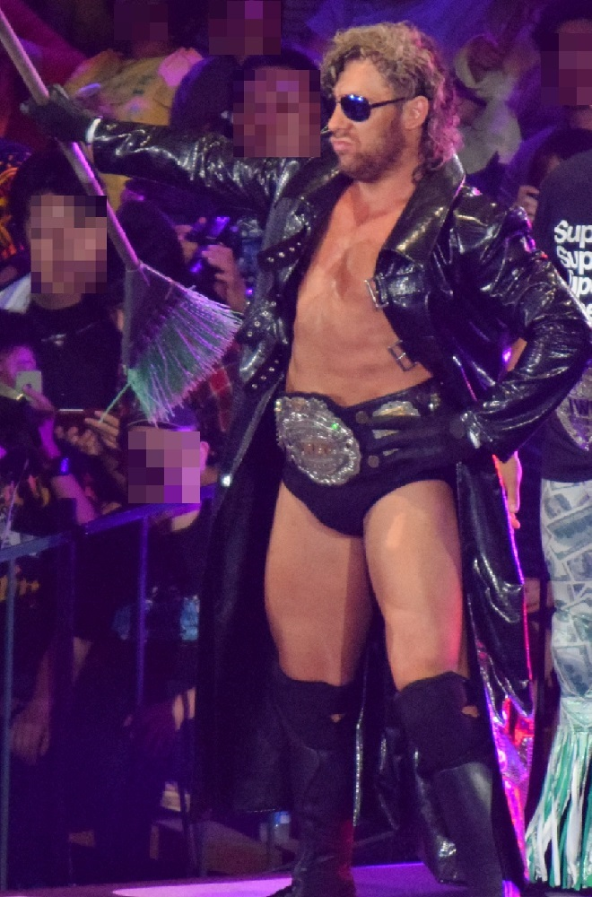 2015年7月5日 大阪城ホール 「DOMINION 7.5 in OSAKA-JO HALL」 ケニー・オメガ